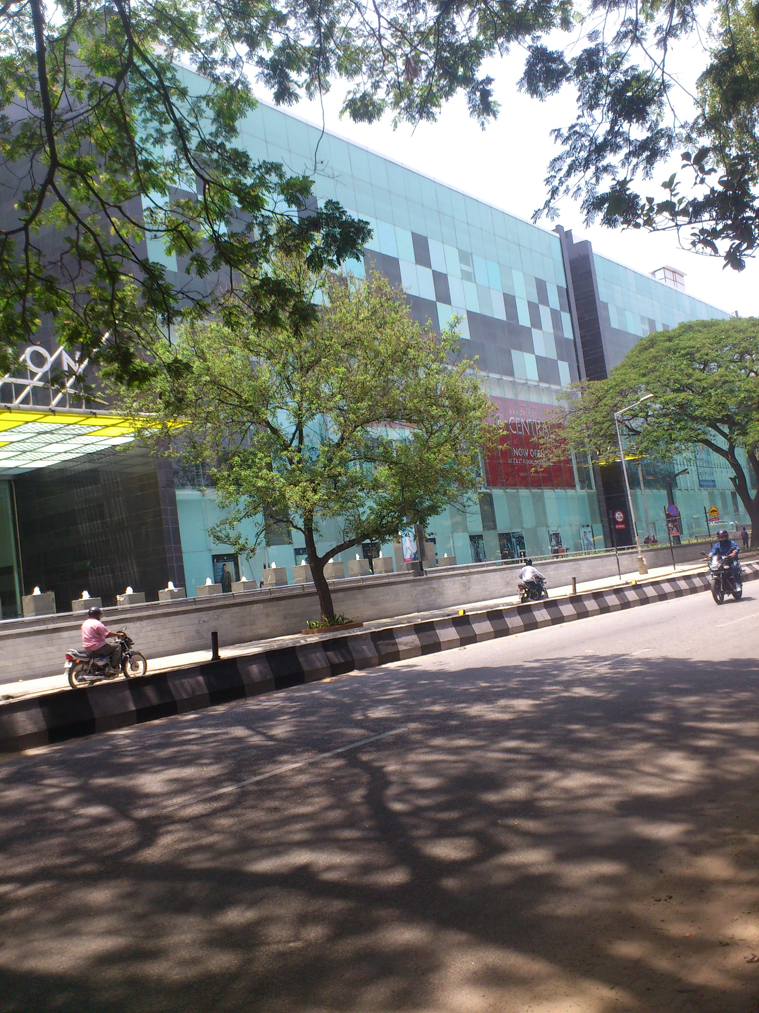 Orion mall Bangalore